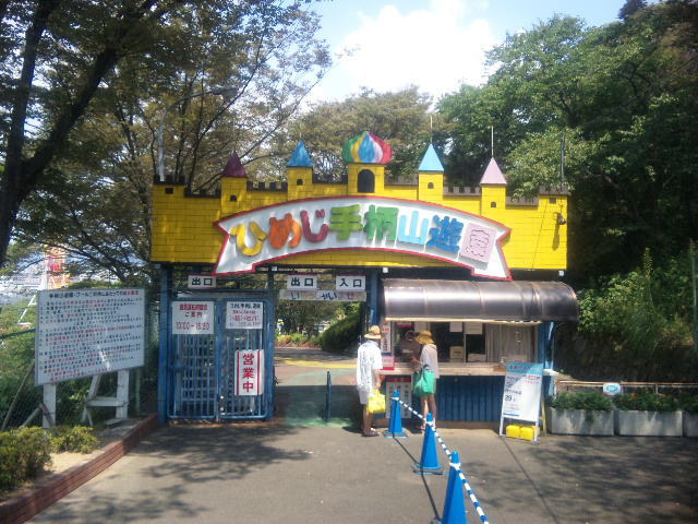 兵庫県姫路市にある「ひめじ手柄山遊園」山上出入口。